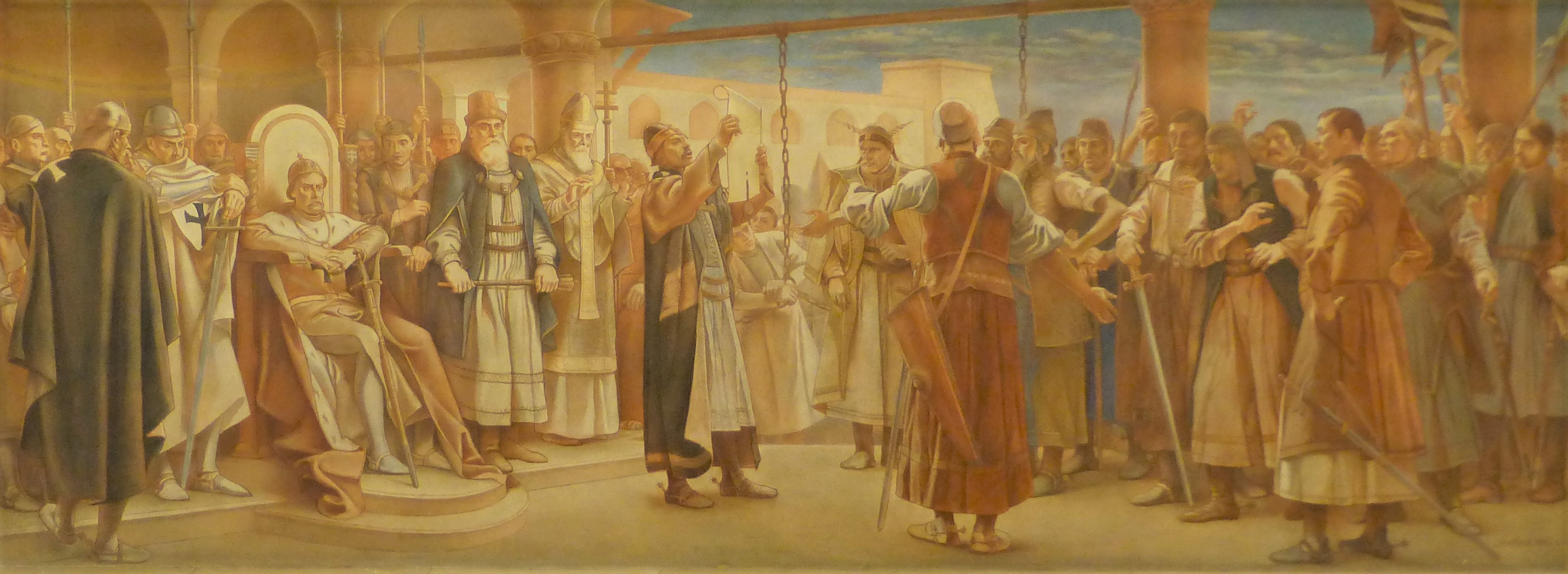 A főrendiházi üléstermében, a pulpitustól balra. Jantyik Mátyás festménye - II. András kihirdeti az Aranybullát.